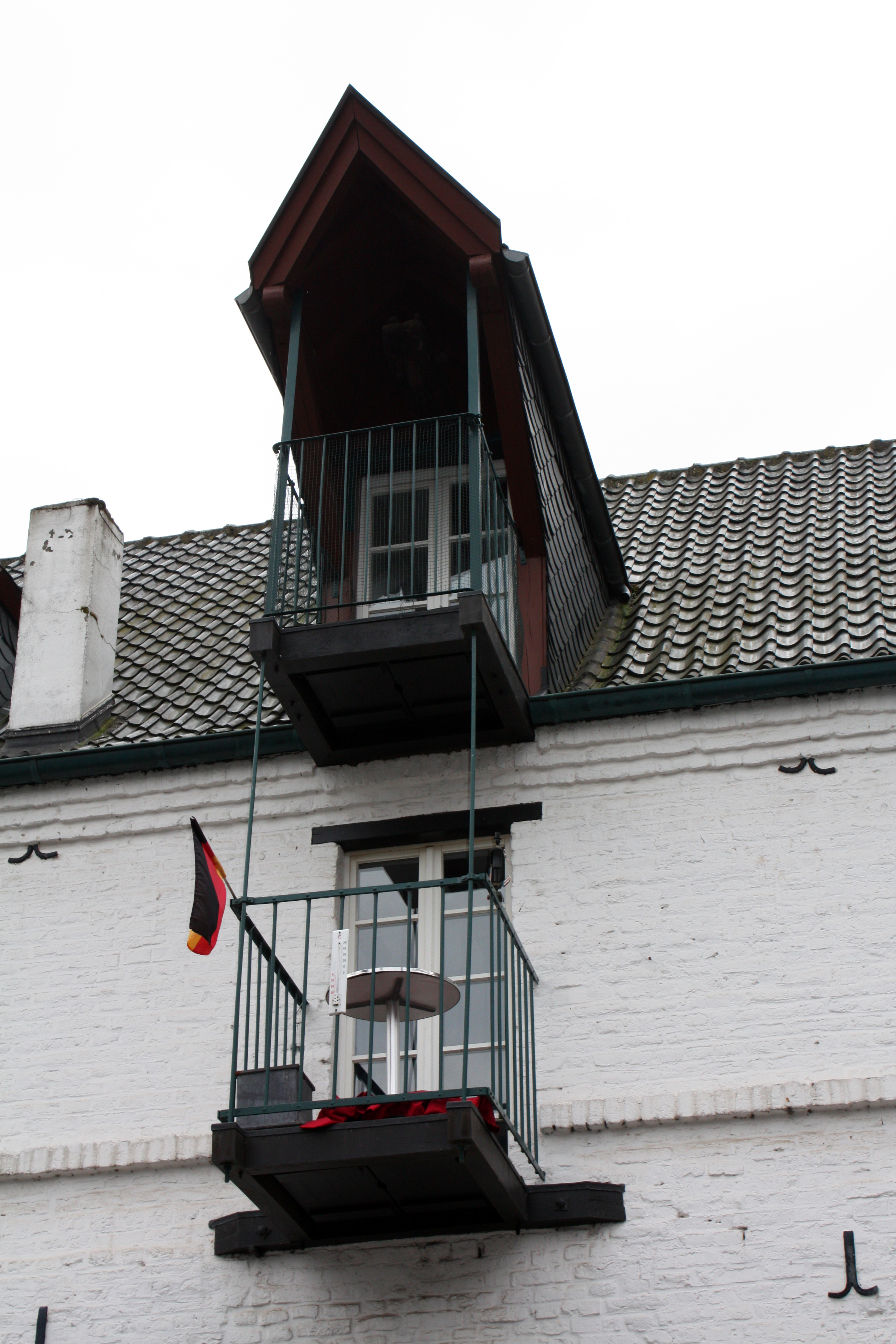 Lechenich Oebelsmühle. Innenhof, Ladegaube im Dach des Hauptgebäudes